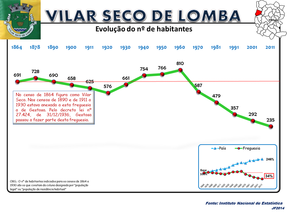 Evolução da População 1864 / 2011